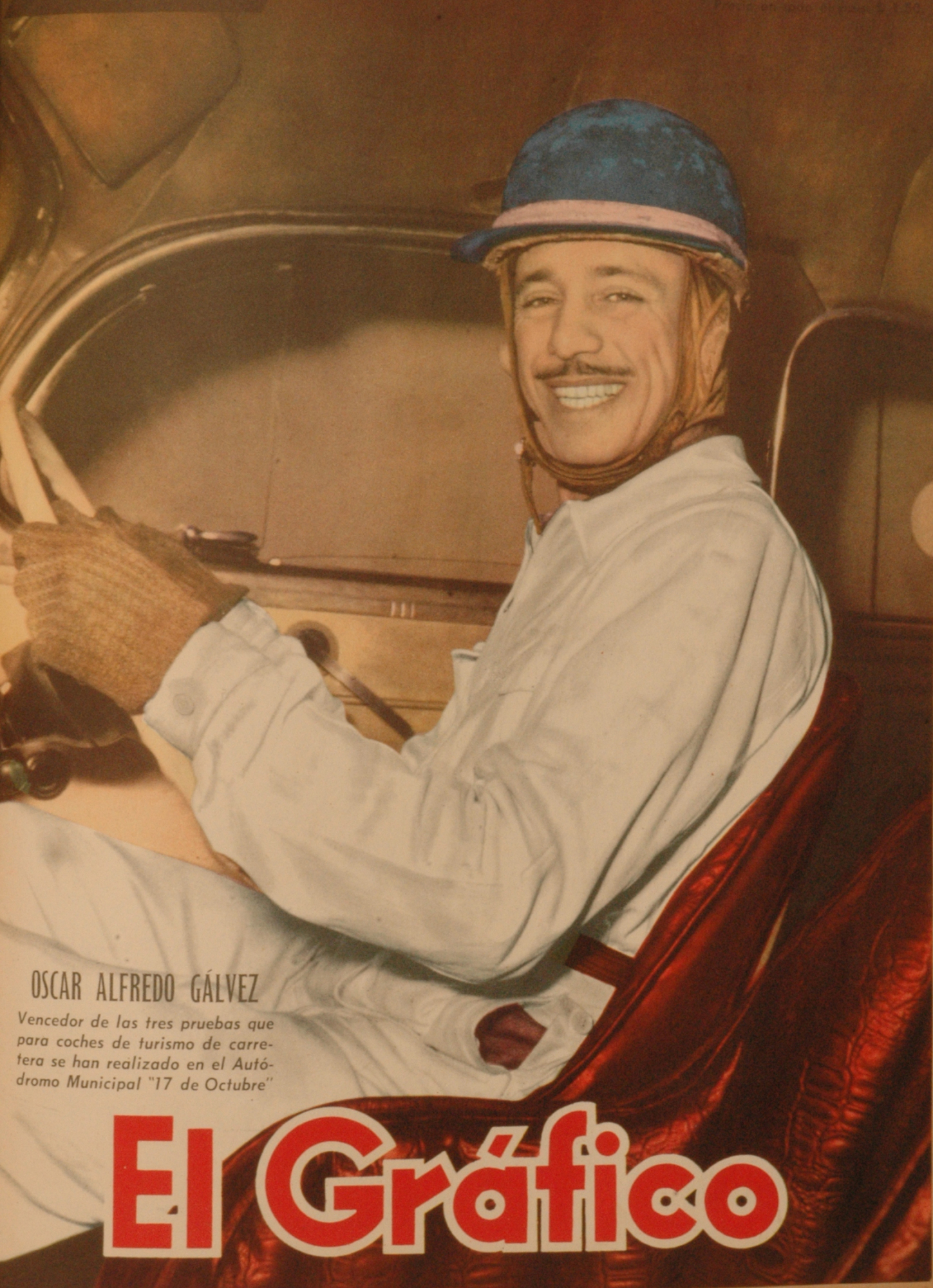 El Grafico del 08 de Agosto de 1952. Edicion 1722